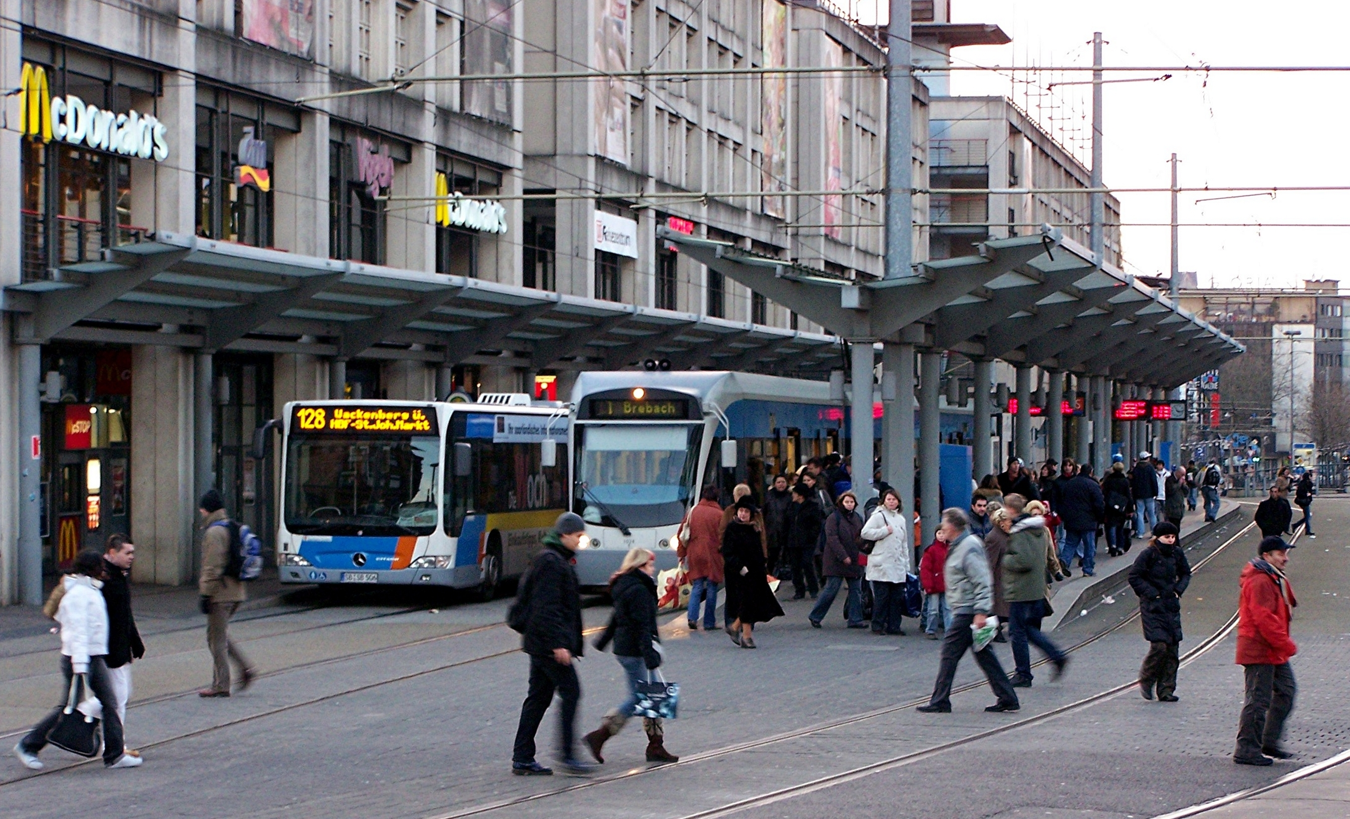 Saarbrücker Stadtbahnwagen 1024 als Linie 1 Richtung Brebach im Paar mit Stadtbus der Linie 128 Richtung Wackenberg am Saarbrücker Hauptbahnhof